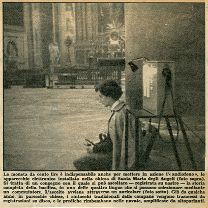 Articolo di giornale relativo all'installazione dei primi audiofoni installati nella Basilica di Santa Maria degli Angeli